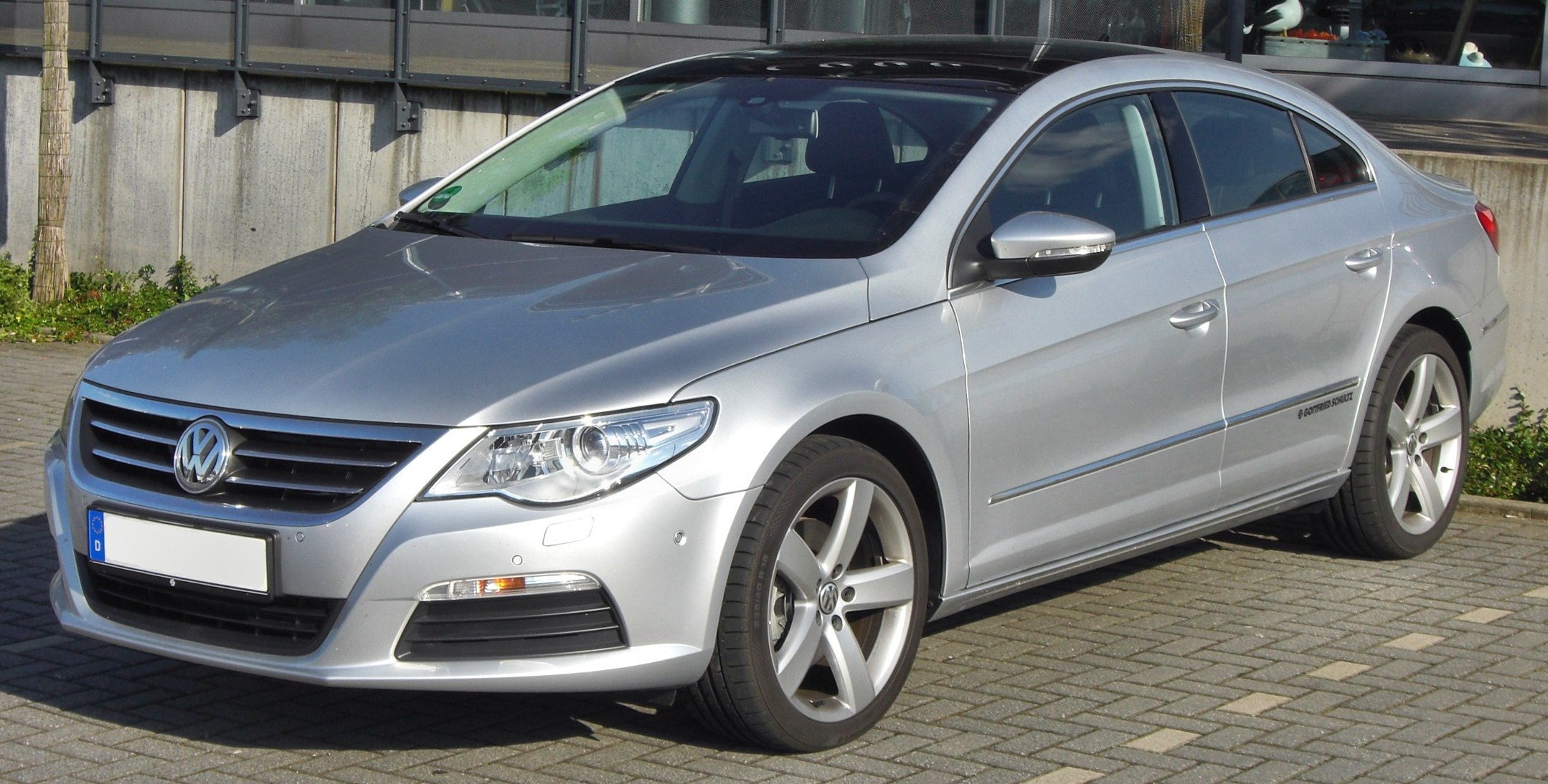 VW Passat CC